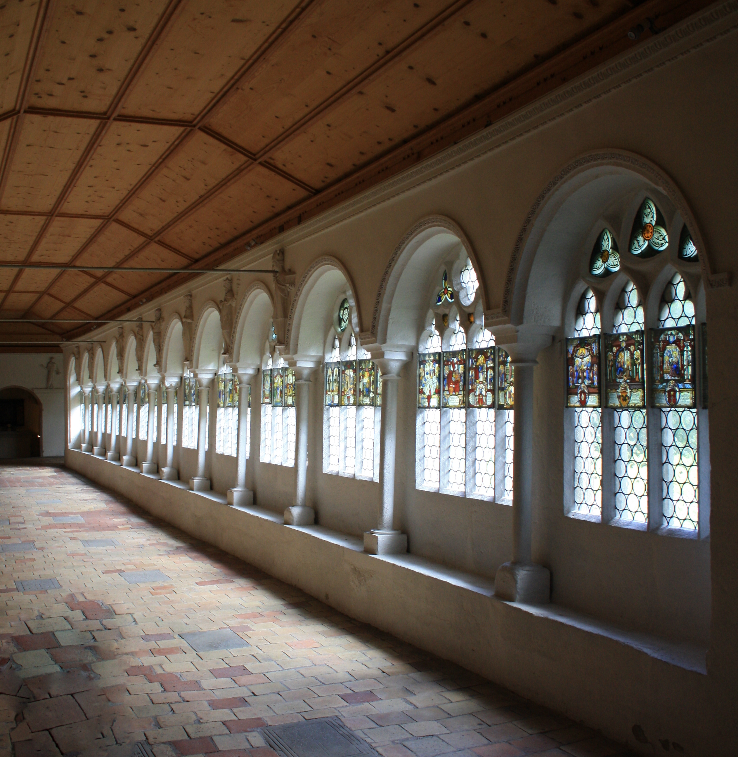 Fensterbögen im Nordarm des Kreuzgangs (Kloster Wettingen